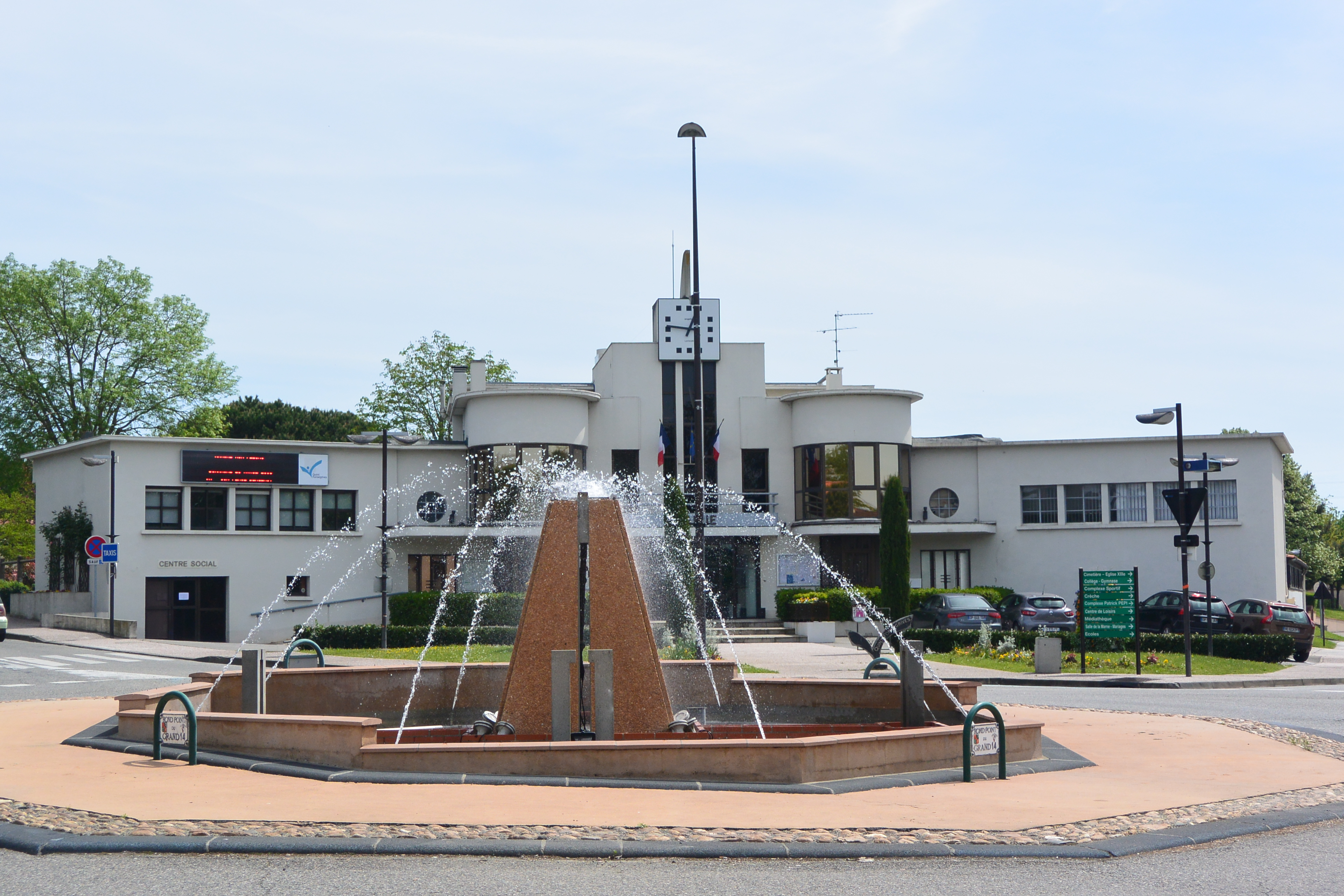 Mairie de Quint-Fonsegrives (31130) derrière la fontaine du rond-point du grand 14